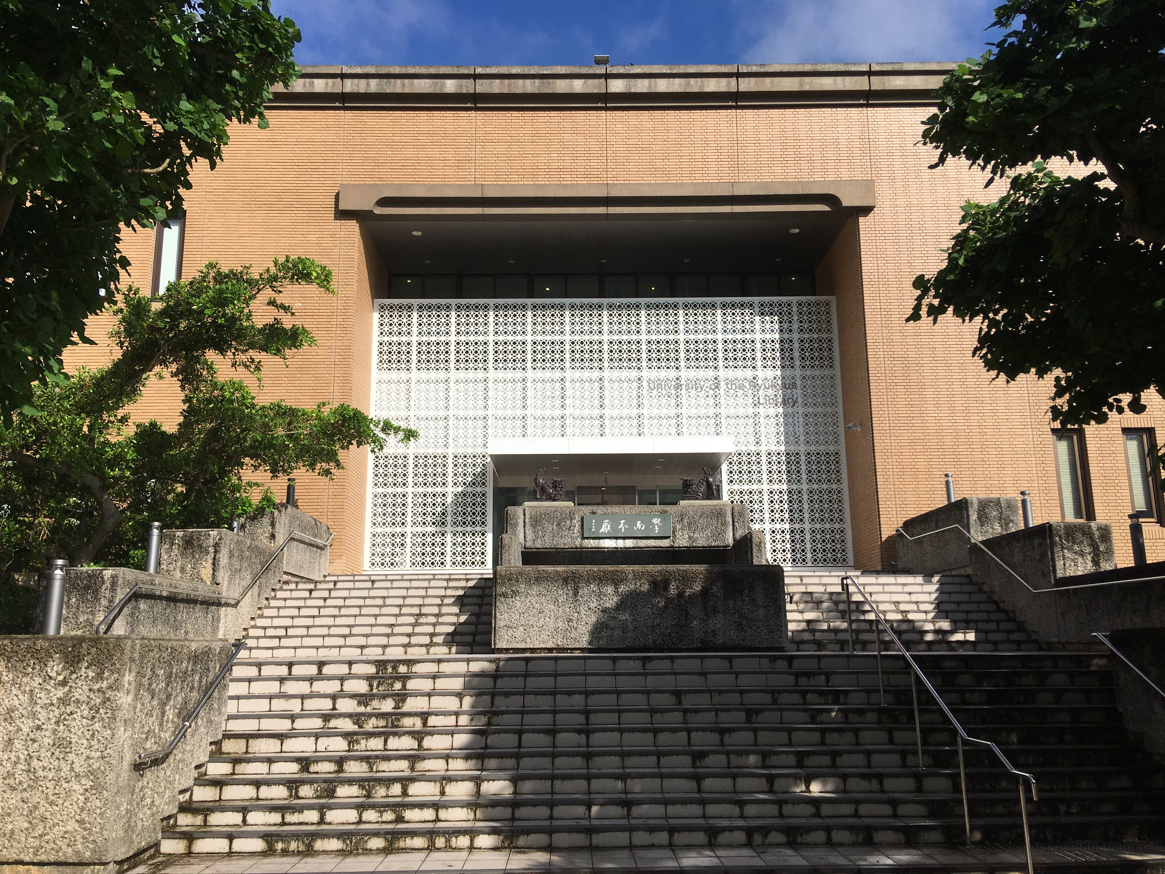 正面から見た附属図書館